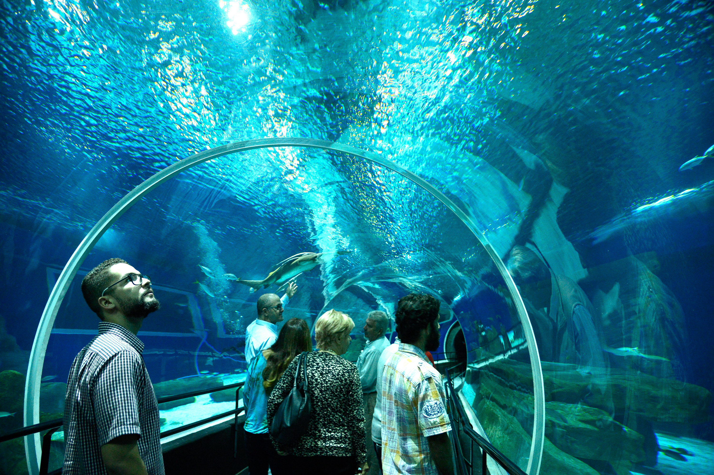 Rio de Janeiro - Em evento no AquaRio a ONU Meio Ambiente lança a campanha mundial "Mares Limpos", que durante cinco anos terá ações para conter a maré de plásticos que invade os oceanos (Tânia Rêgo/Agência Brasil)